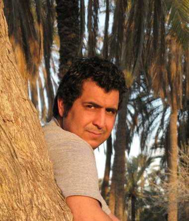 مهدی فرجی، شاعر معاصر ایرانی Mehdi Faraji, Iranian Poet